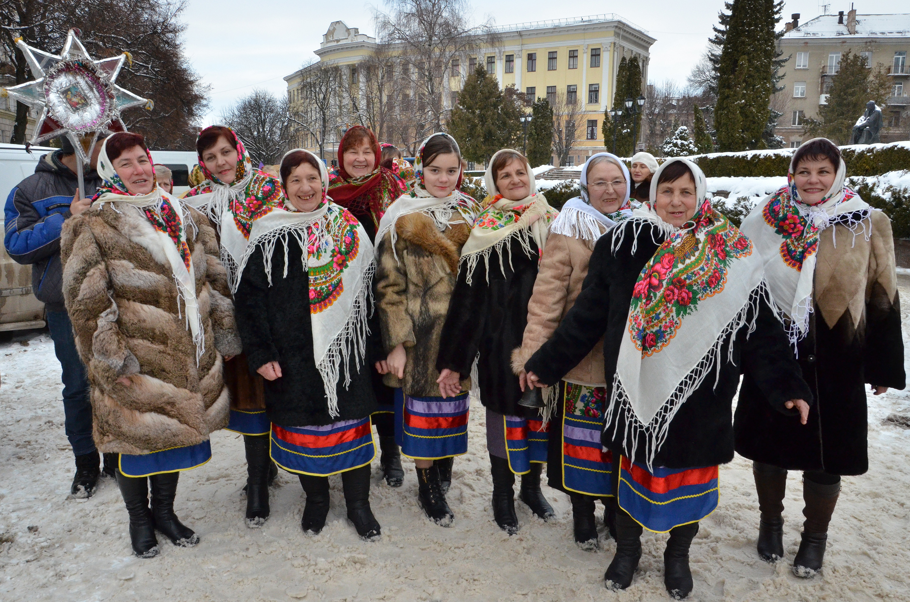 Фольклорно-етнографічний колектив «Андрузькі молодиці» із с. Андруга Кременецького району на параді вертепів у Тернополі 15 січня 2017 року.